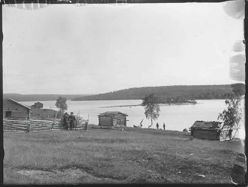 Wessel, Ellisif Rannveig To menn foran en skigard. Skolteboplass. Bildetekst fra bok; Vaggatem, skolteboplass på Nakholmen. Juli 1897. Johansen, Austerm og Røde, 2007 NMFF.002138